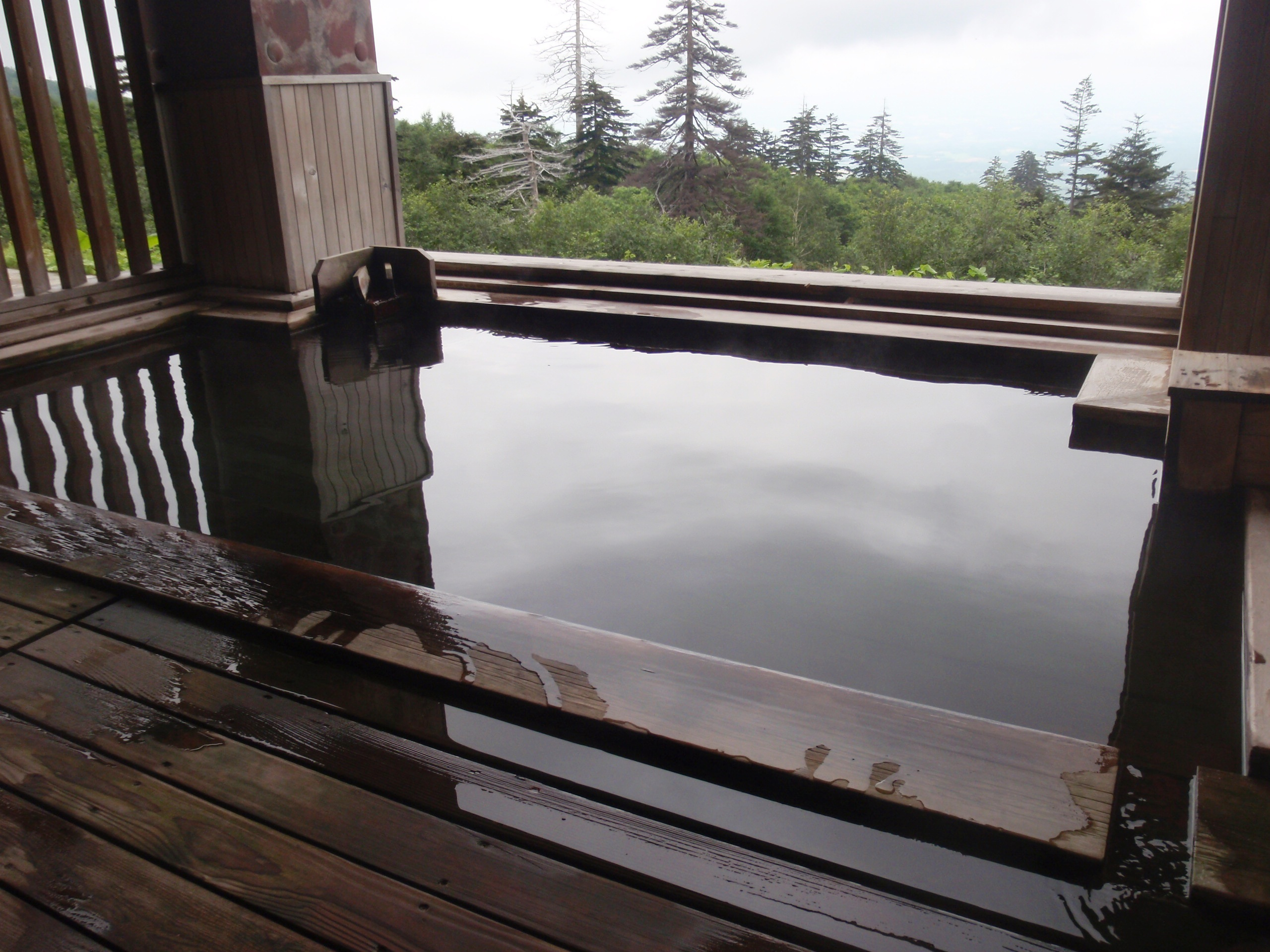 十勝岳温泉カミホロ荘露天風呂。富良野盆地を見下ろす。